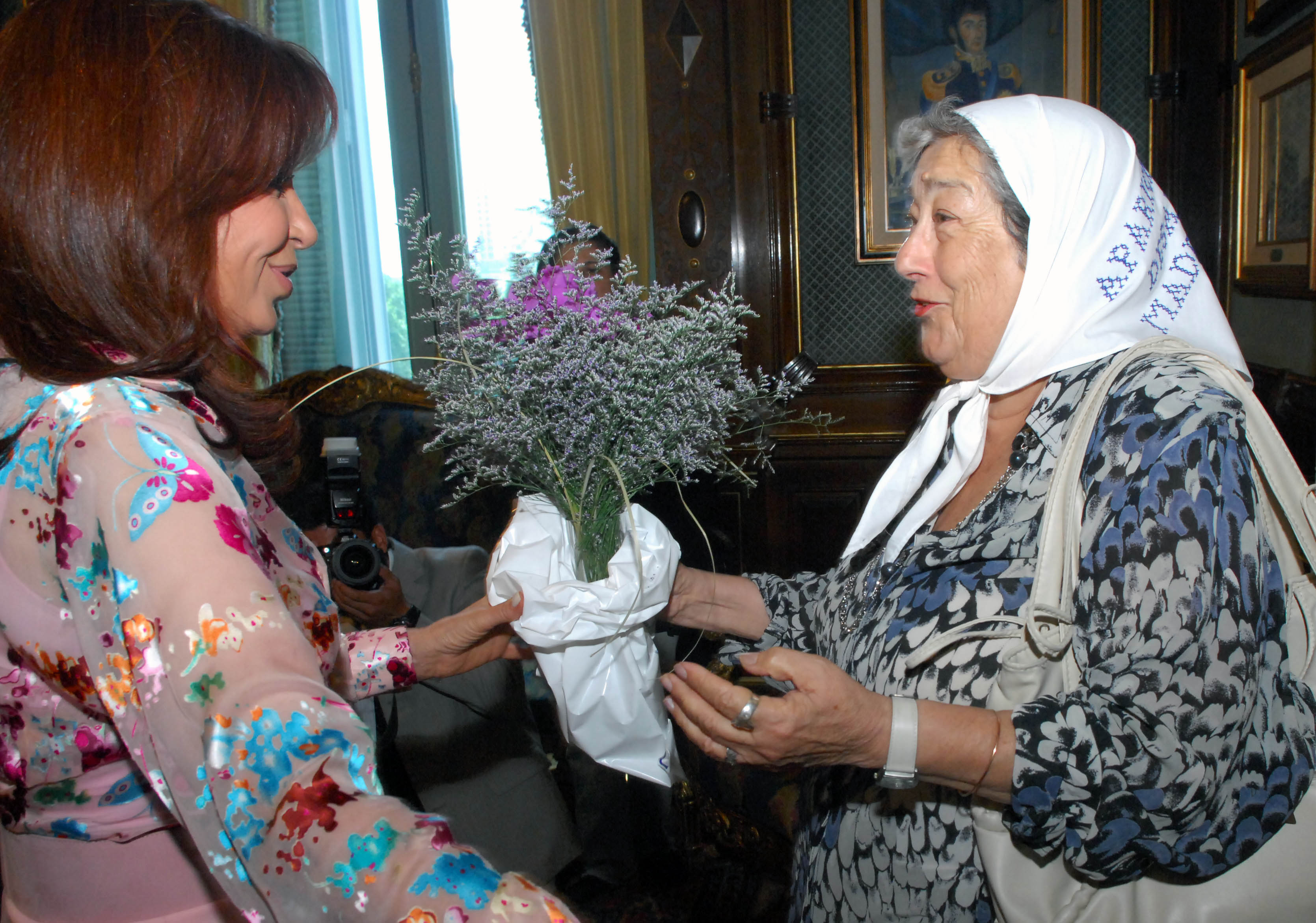 Hebe de Bonafini con Cristina Fernandez, presidenta de Argentina.